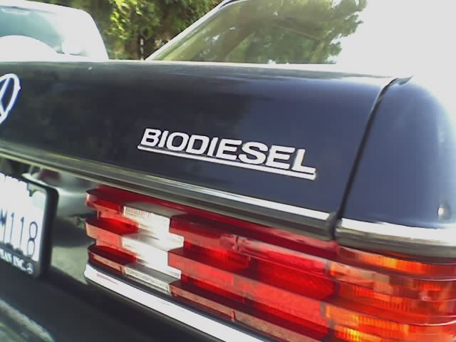 biodiesel Mercedes emblem